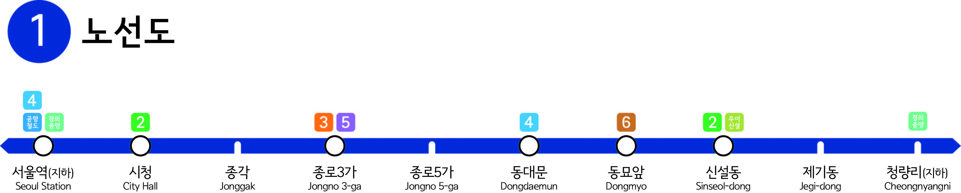 서울지하철1호선 노선도